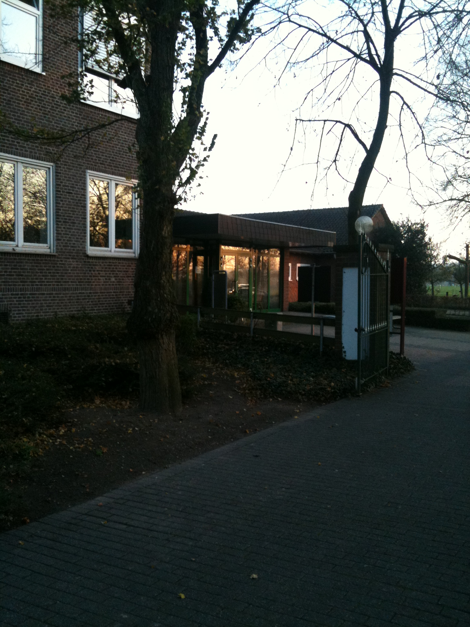 Haus Riswick